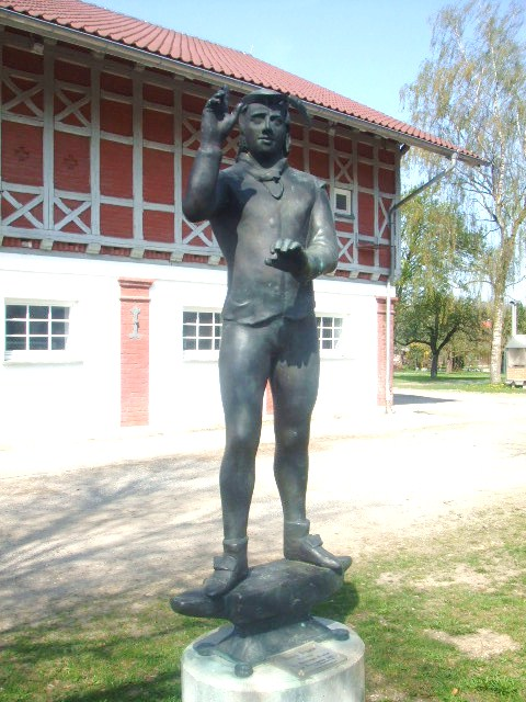 Sulmingen, Gemeinde Maseklkheim, Statue des Ulrich Schmied, Anführer des Baltringer Haufens